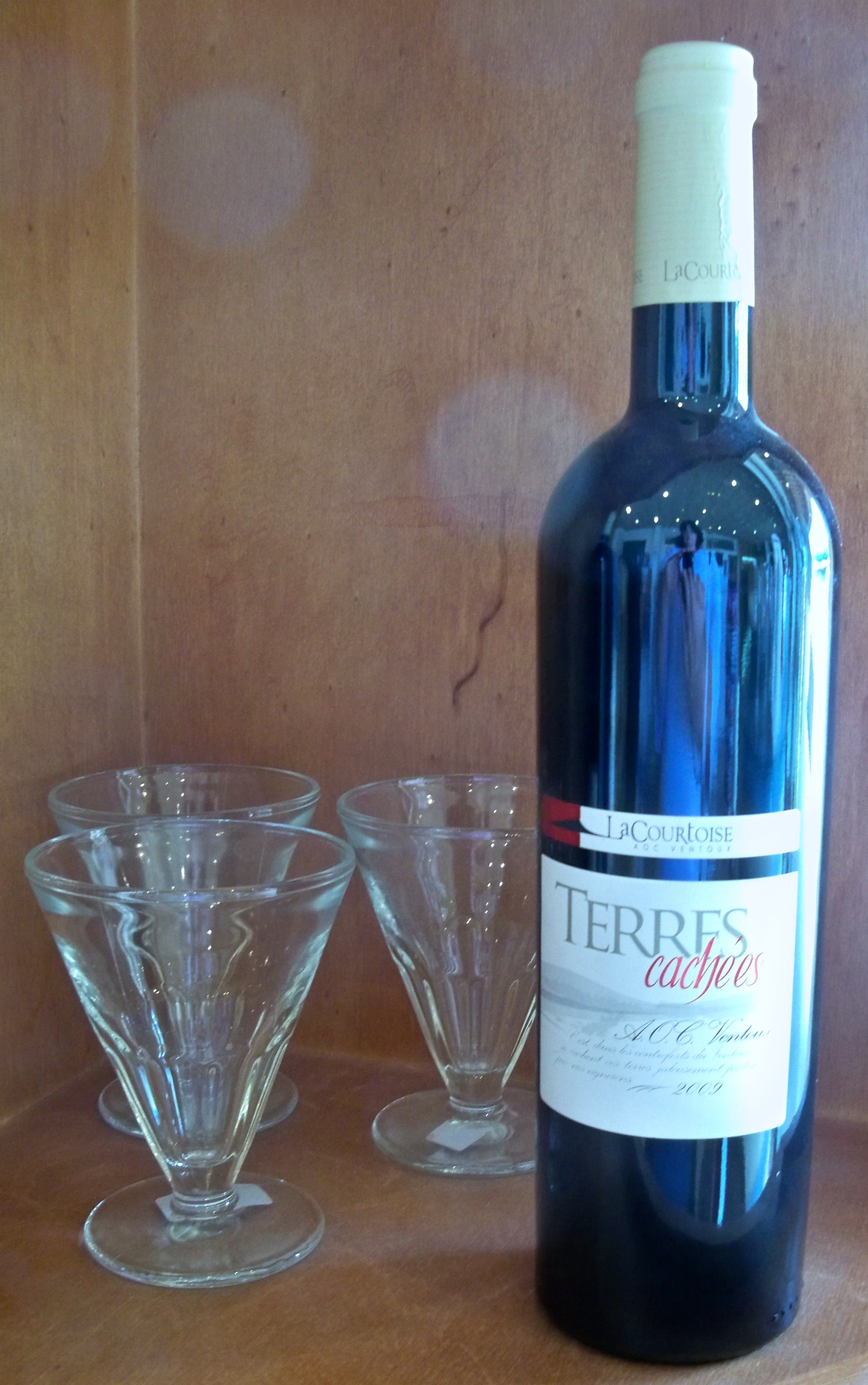 bouteille de Ventoux AOC